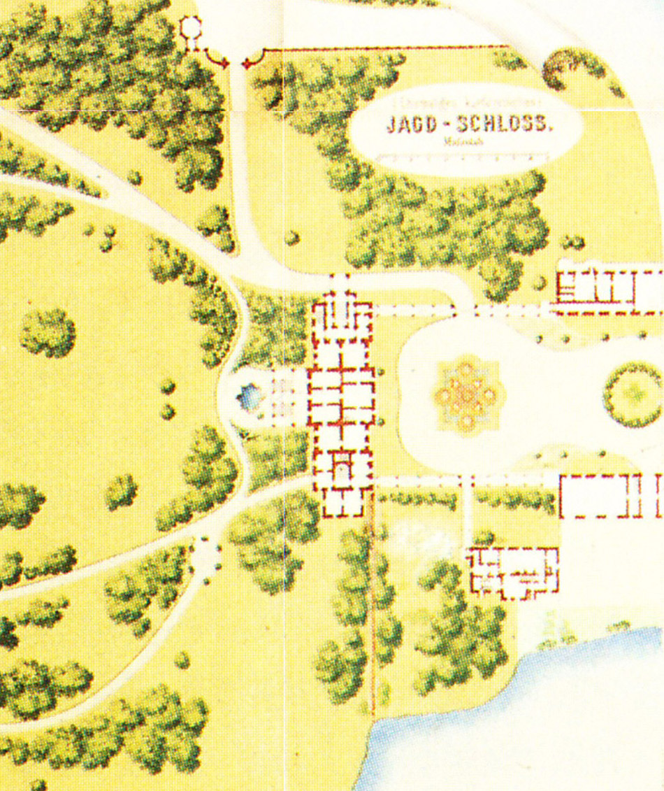 Jagdschloss-Sonderplan aus der Karte des Parks Klein-Glienicke von Kraatz, 1862